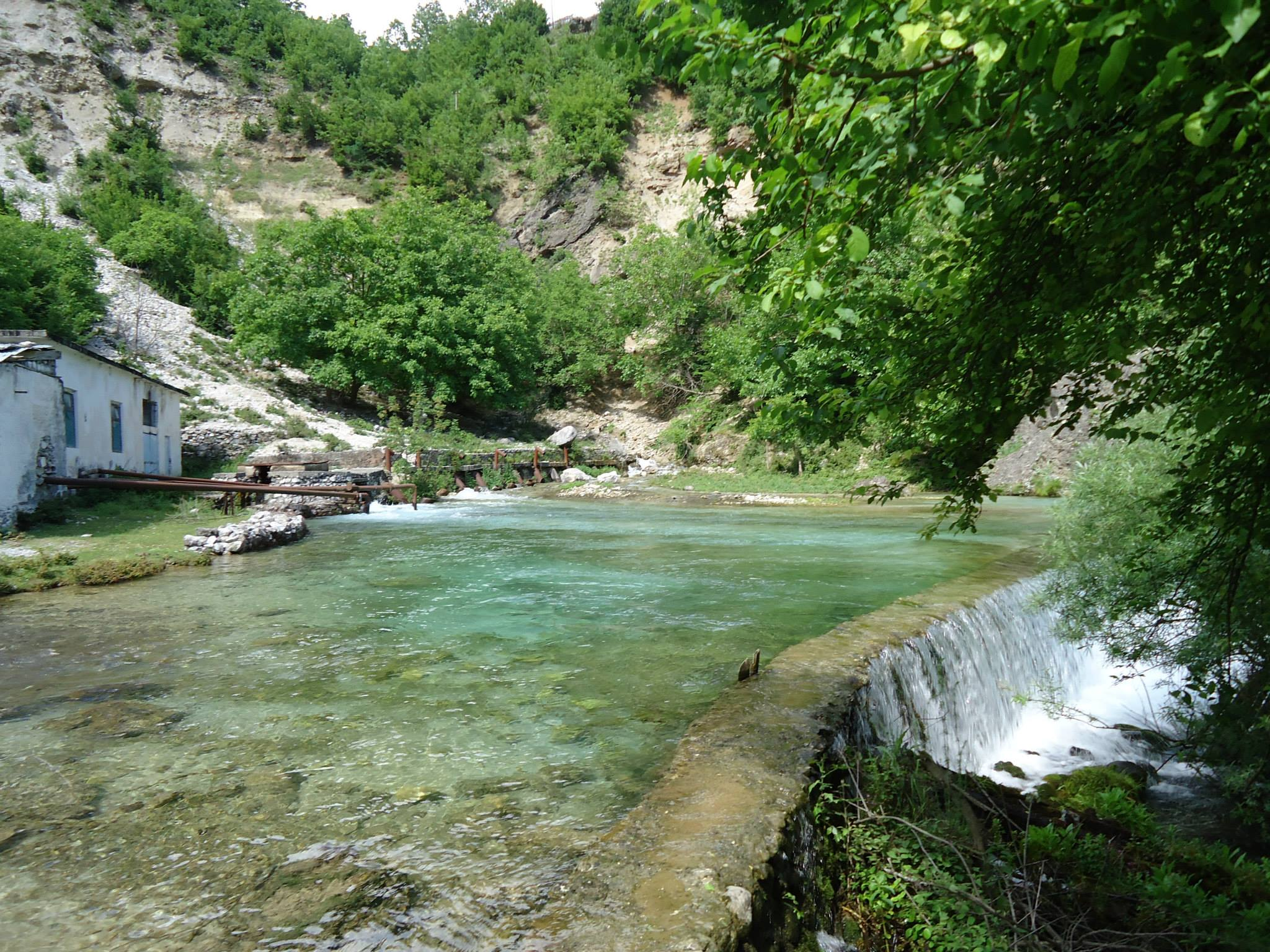 Burimi ujor qe ndodhet ne hyrje te lugines se Valbones dhe eshte nder me te medhenjte ne Ballkan